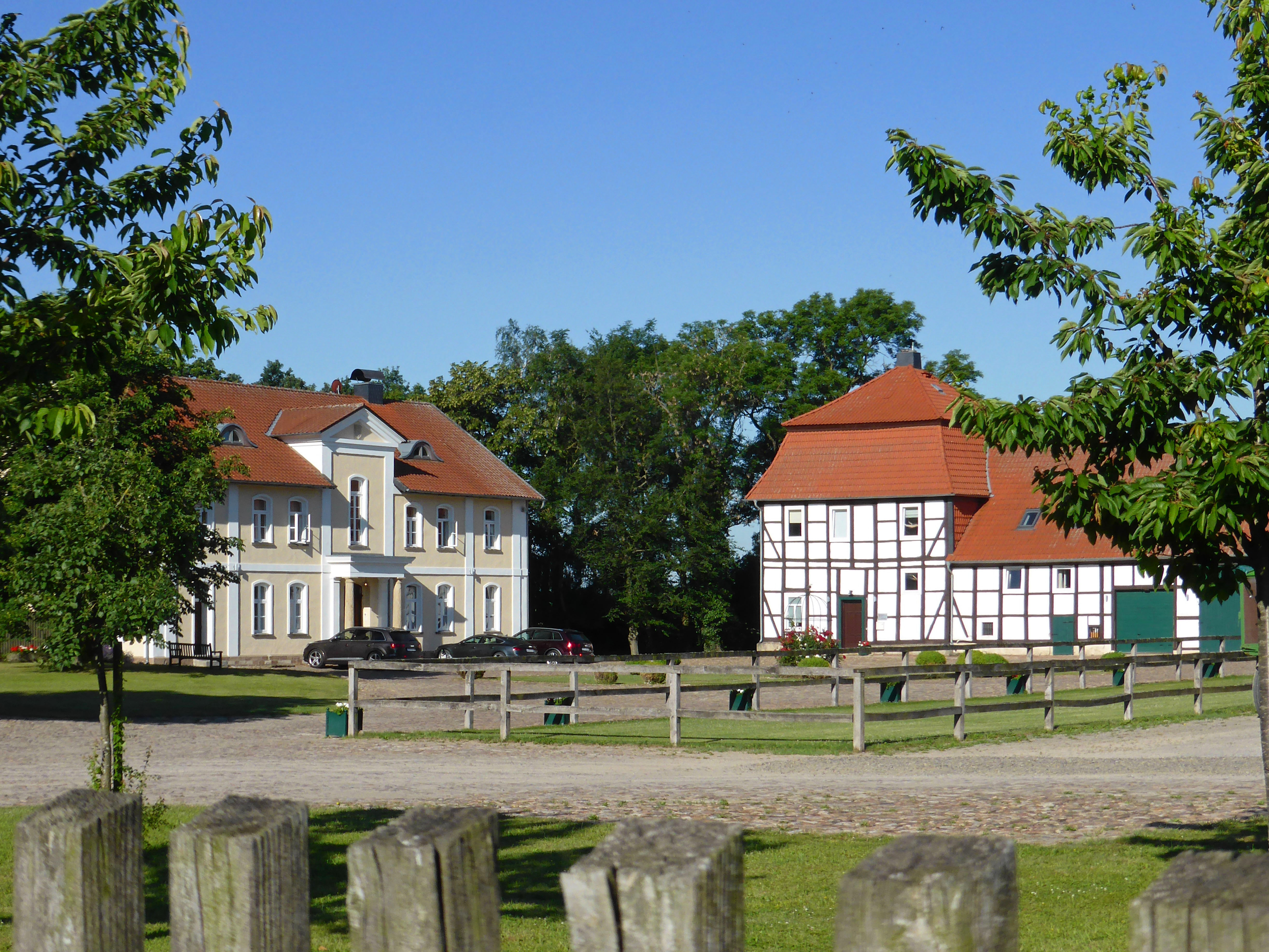 Teilansicht des Gutes Bisdorf.